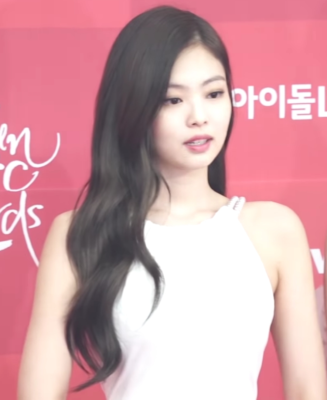 20190106 (NEWSEN) 블랙핑크(BLACKPINK), 수줍은 많은 소녀지만 돋보이는 아름다운 미모 (Glden Disc Awards 2019)